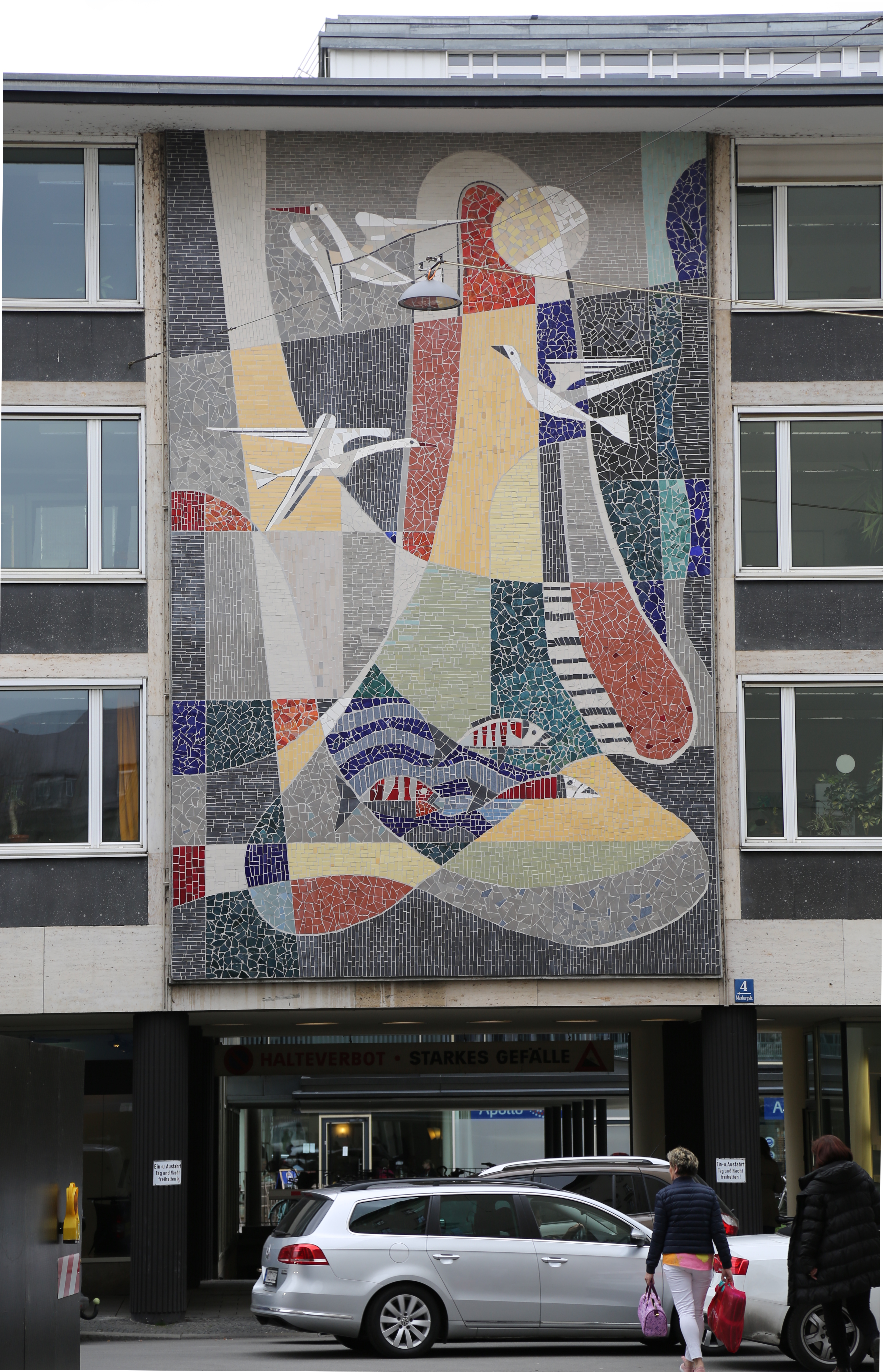 Maxburg, München